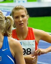 100m B-Lauf ISTAF 2006: Mareike Peters